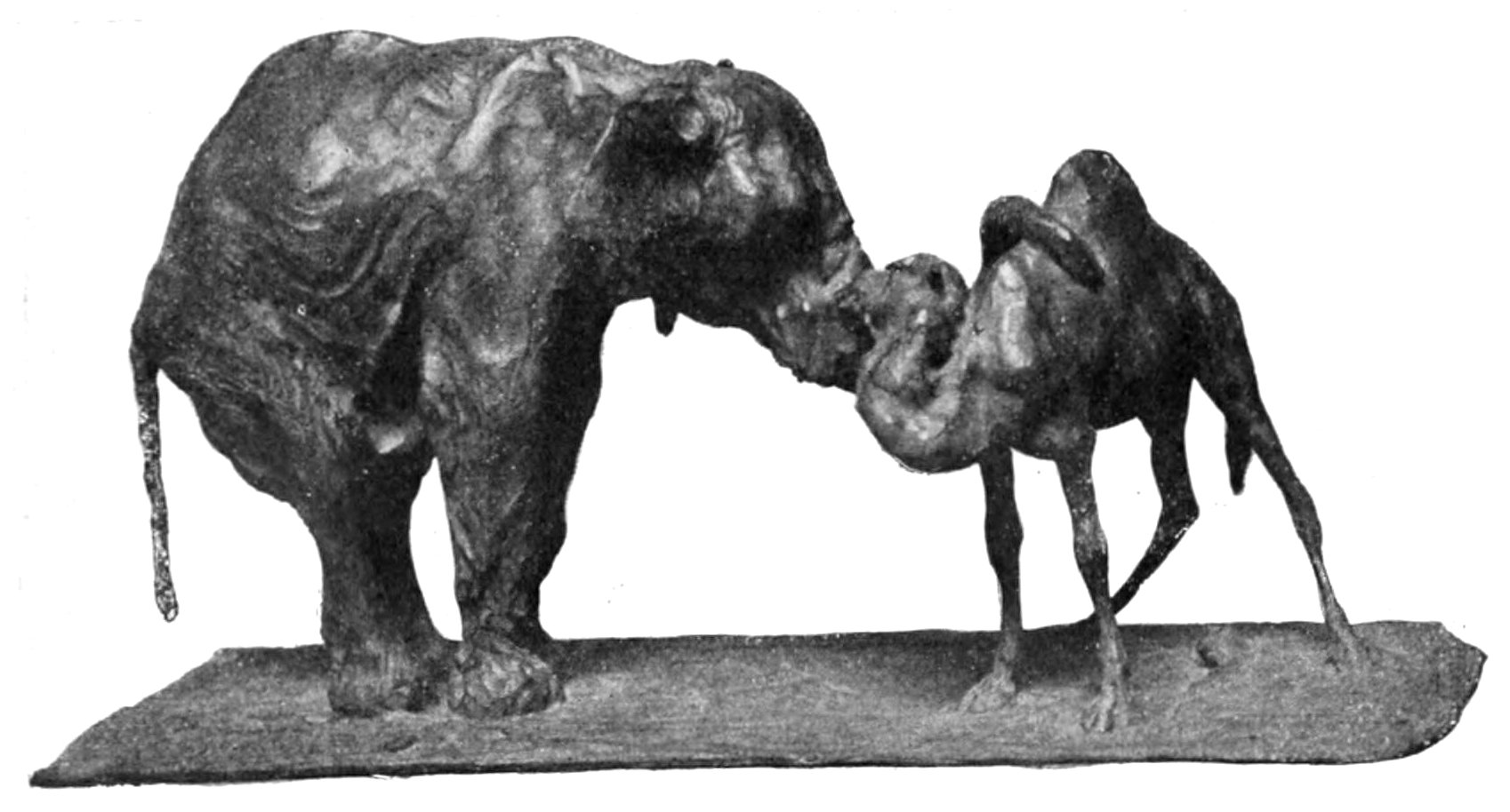 Éléphant d'Afrique et jeune chameausculpture en bronze, fonte à la cire perdue A.A.Hébrard, édition originale